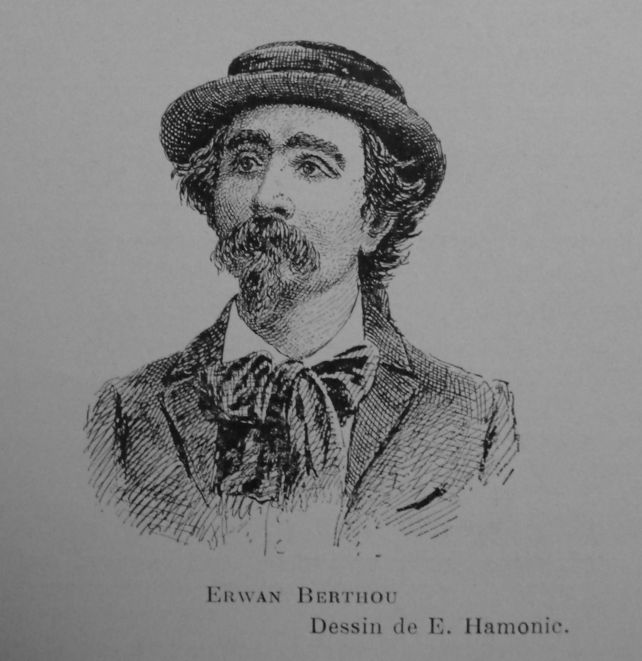 Illustration pour la chronique mortuaire d'Erwan Berthou dans la revue La Bretagne, illustration d'E. Hamonic